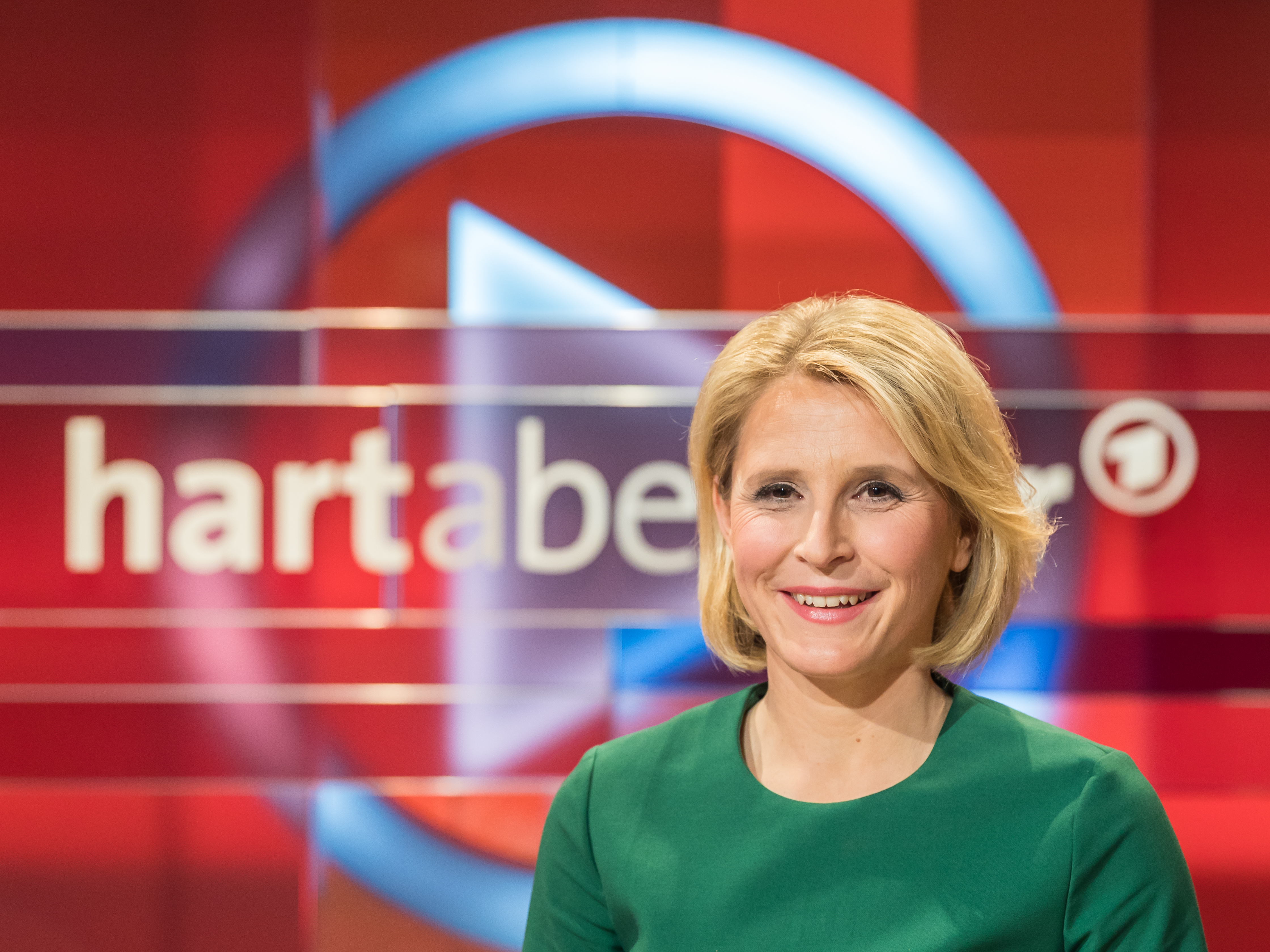 Pressetermin nach der Sendung „Hart aber Fair“ am 3. Februar 2020. Thema der Sendung: „Hier Bonpflicht, da Krötenschutz – alles geregelt, aber nichts geht mehr?" Foto: Susan Link, Moderatorin der Sendung